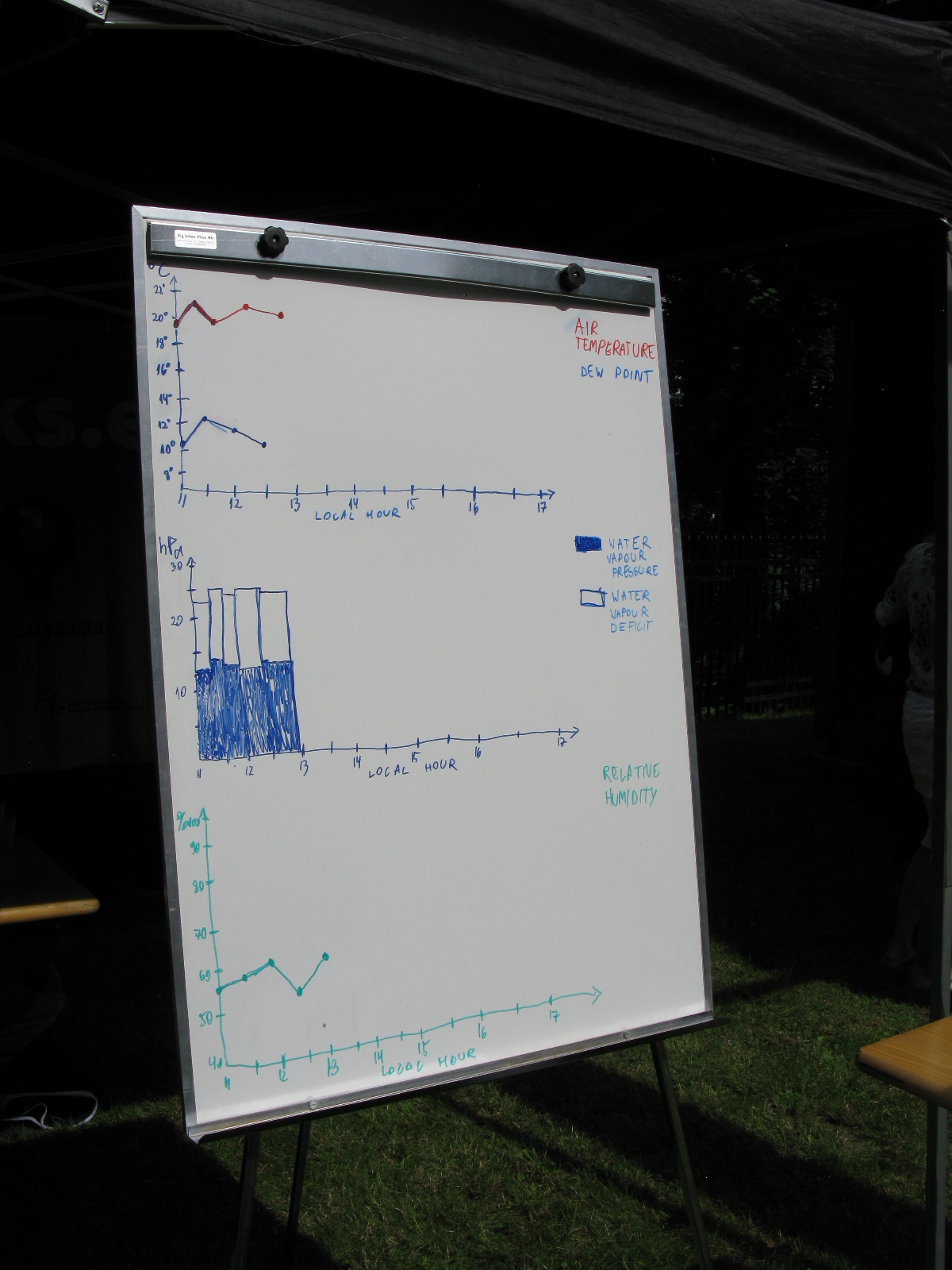 Ilmamõõtmise graafikud Tartu tähetorni juures Toomemäel Tartu hansapäevadel, 20. juuli 2012. Foto: Oop.